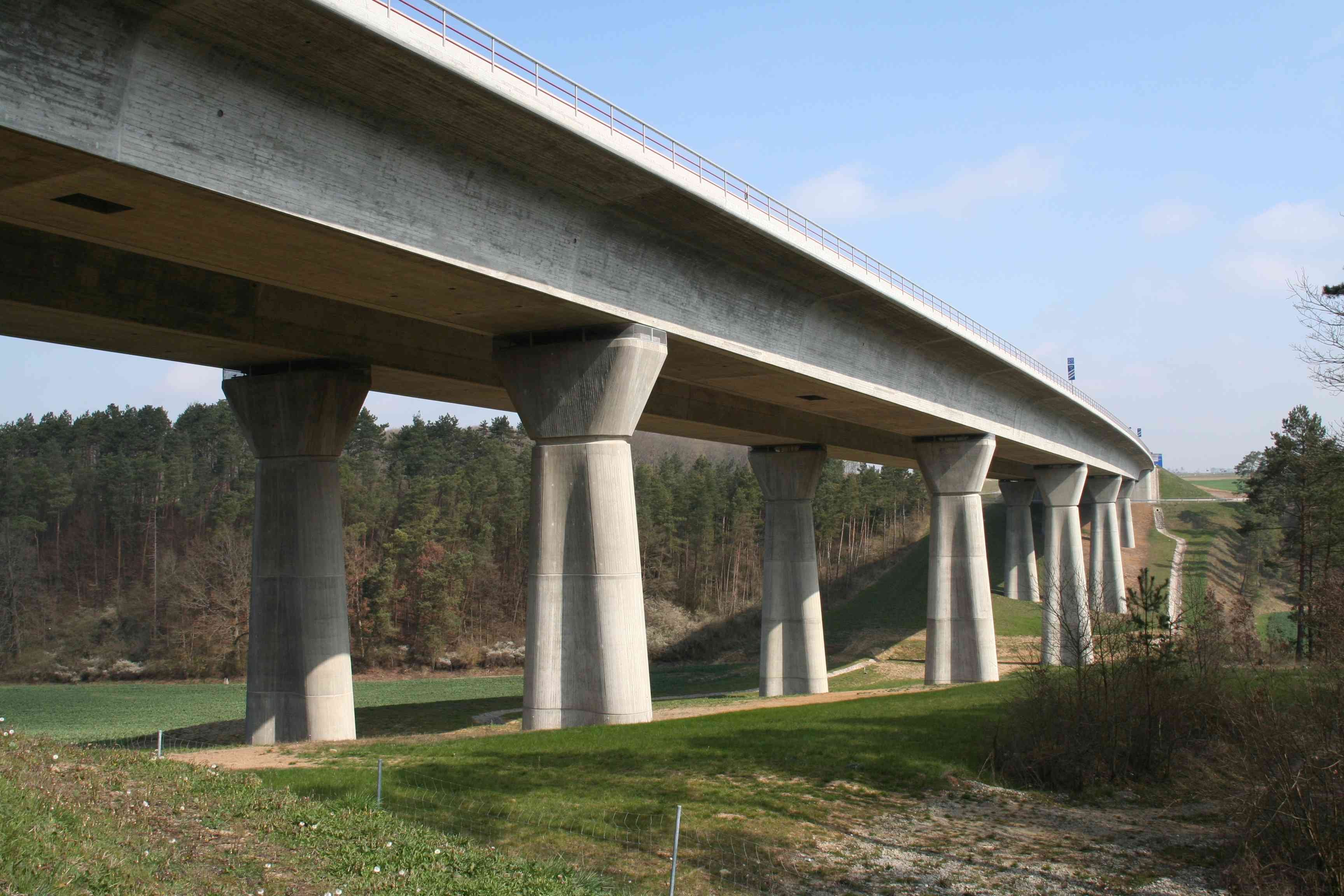 Thalwassertalbrücke Bundesautobahn A71 bei Poppenlauer in Unterfranken